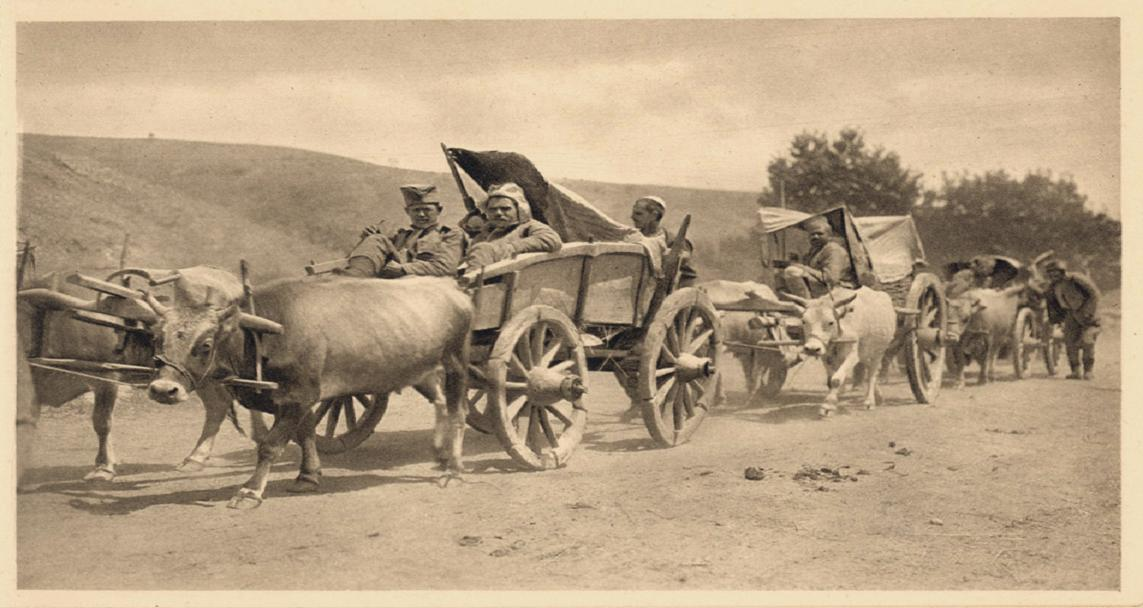 Транспорт рањеника после битке са Бугарима на Брегалници, фотографија Самсона Чернова објављена у албуму „Петогодишњи рат – Срби 1912-1916“ у Лондону 1916. године.